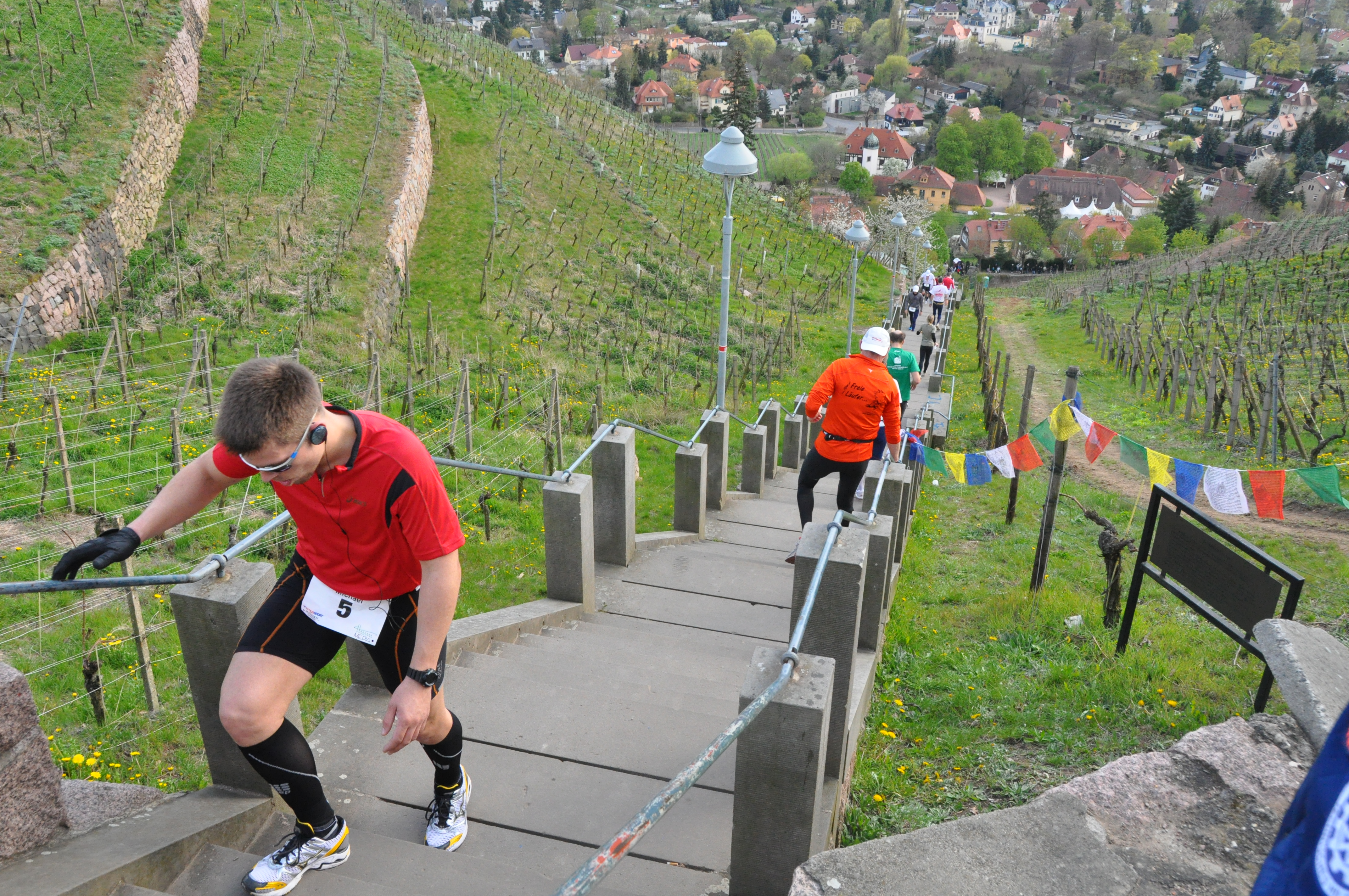 Spitzhaustreppenlauf 2012